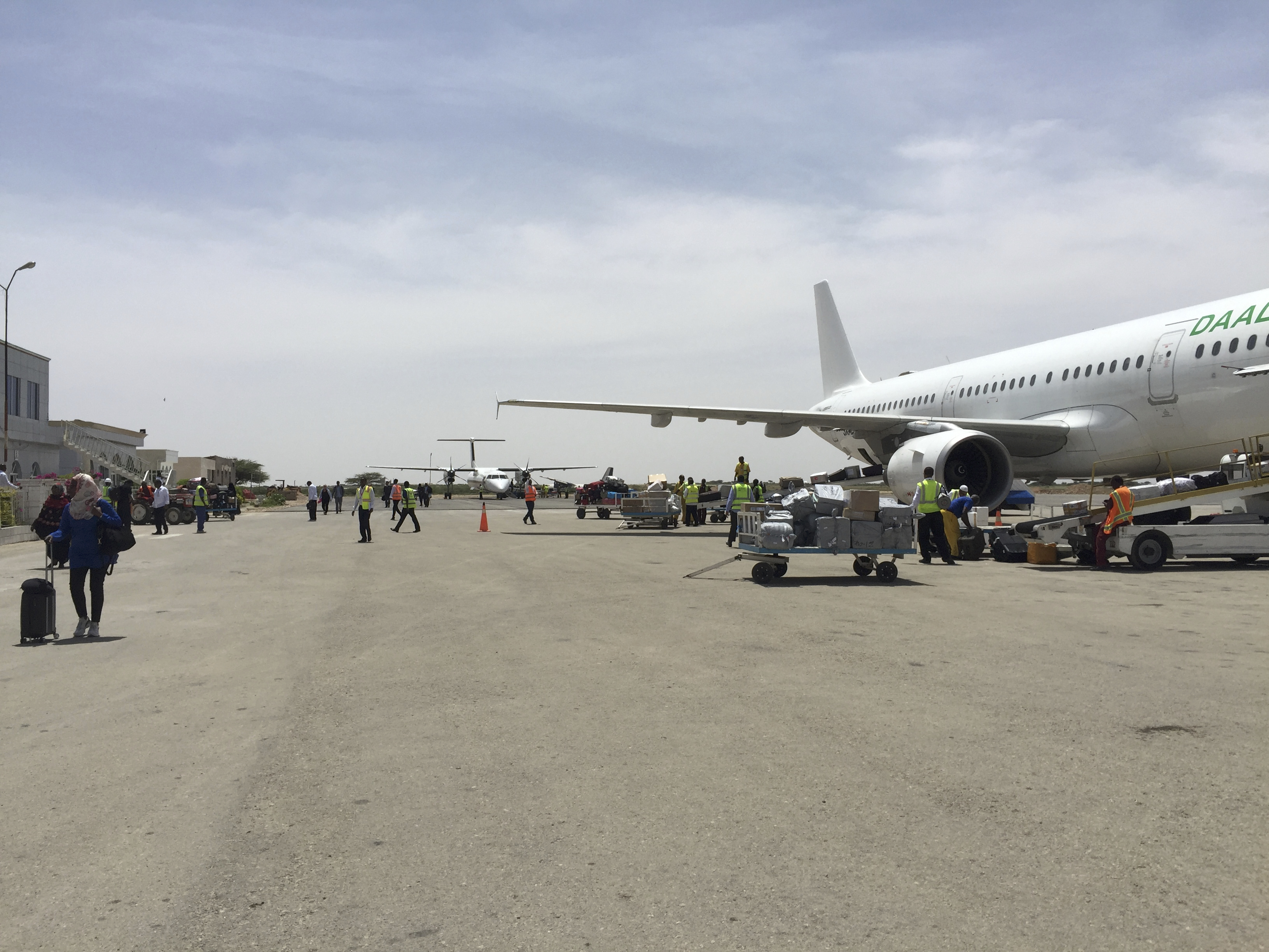 Somaliland and Hargeisa